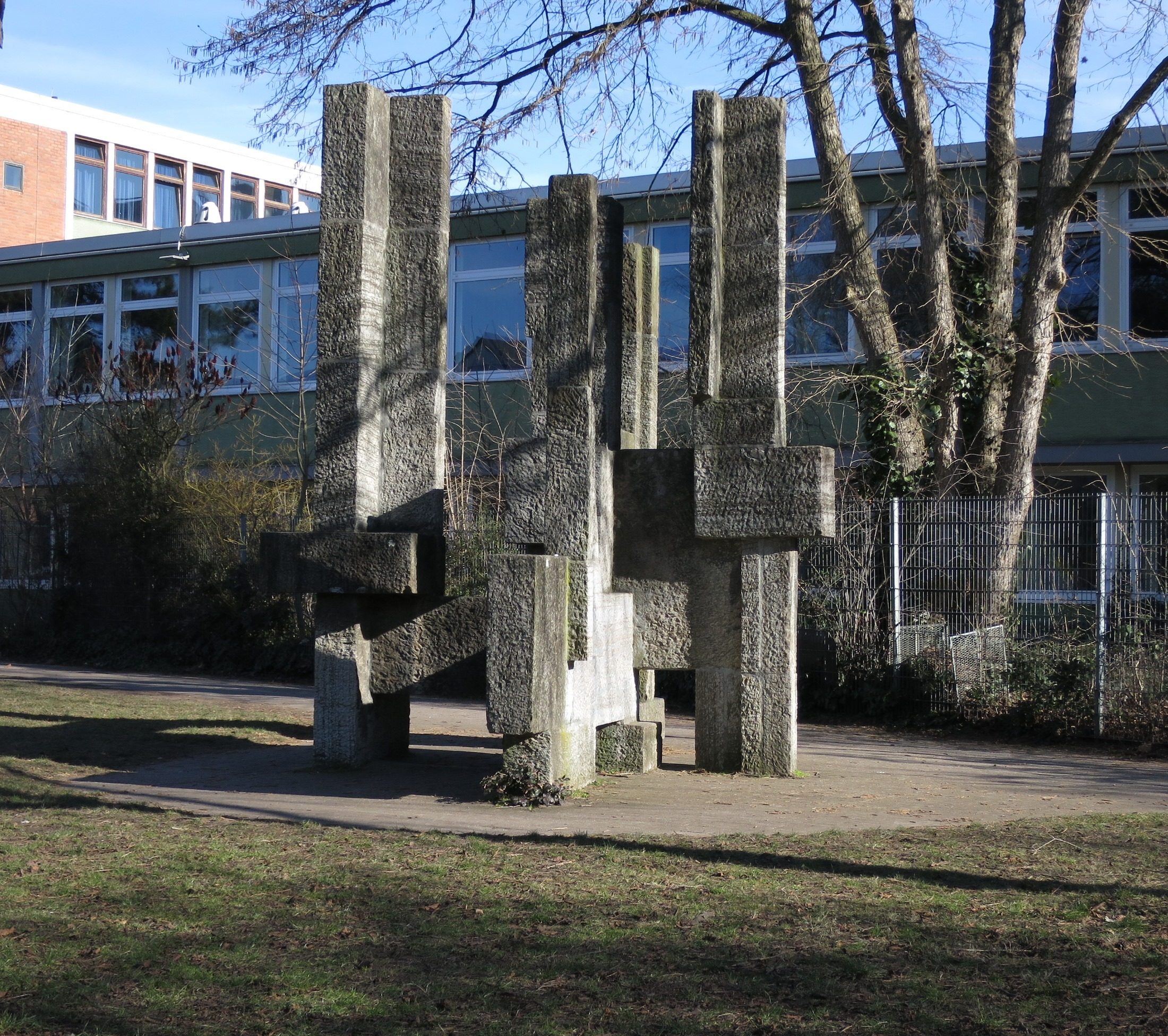 Josef Rikus, Stele (1963) - Schillergymnasium, Köln-Sülz